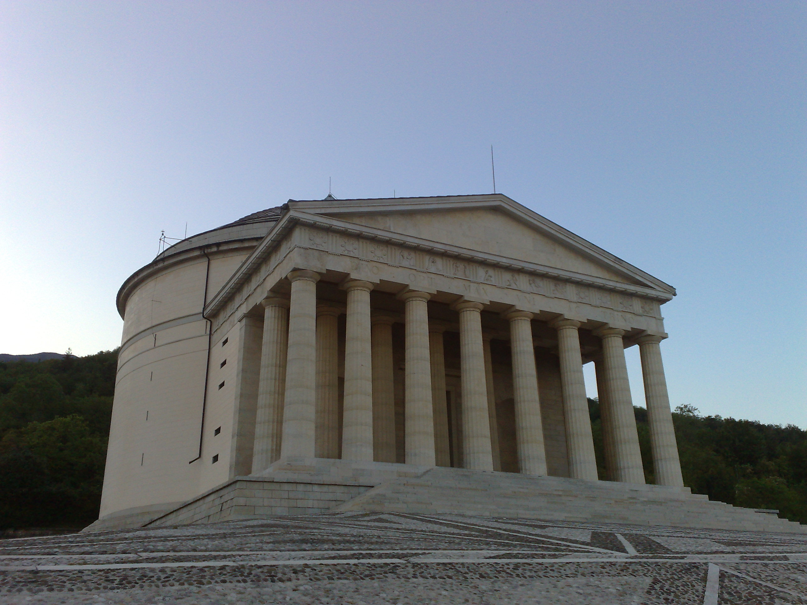 Tempio di Canova a Possagno